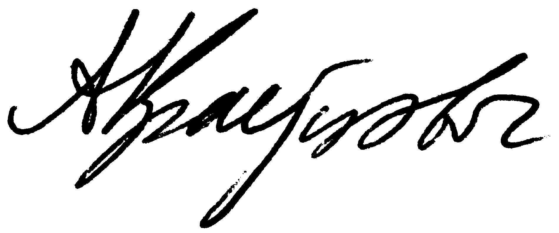 Podpis prof. dr hab. Alaksandra Kraucewicza, białoruskiego historyka pracującego na Białorusi i w Polsce.